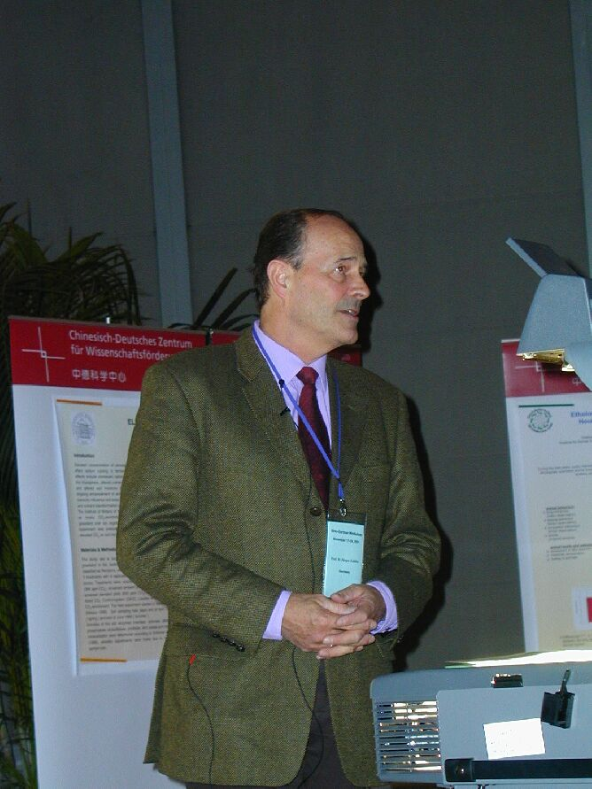 Jürgen Zeddies, Tagung in Peking, China, 18.11.2001